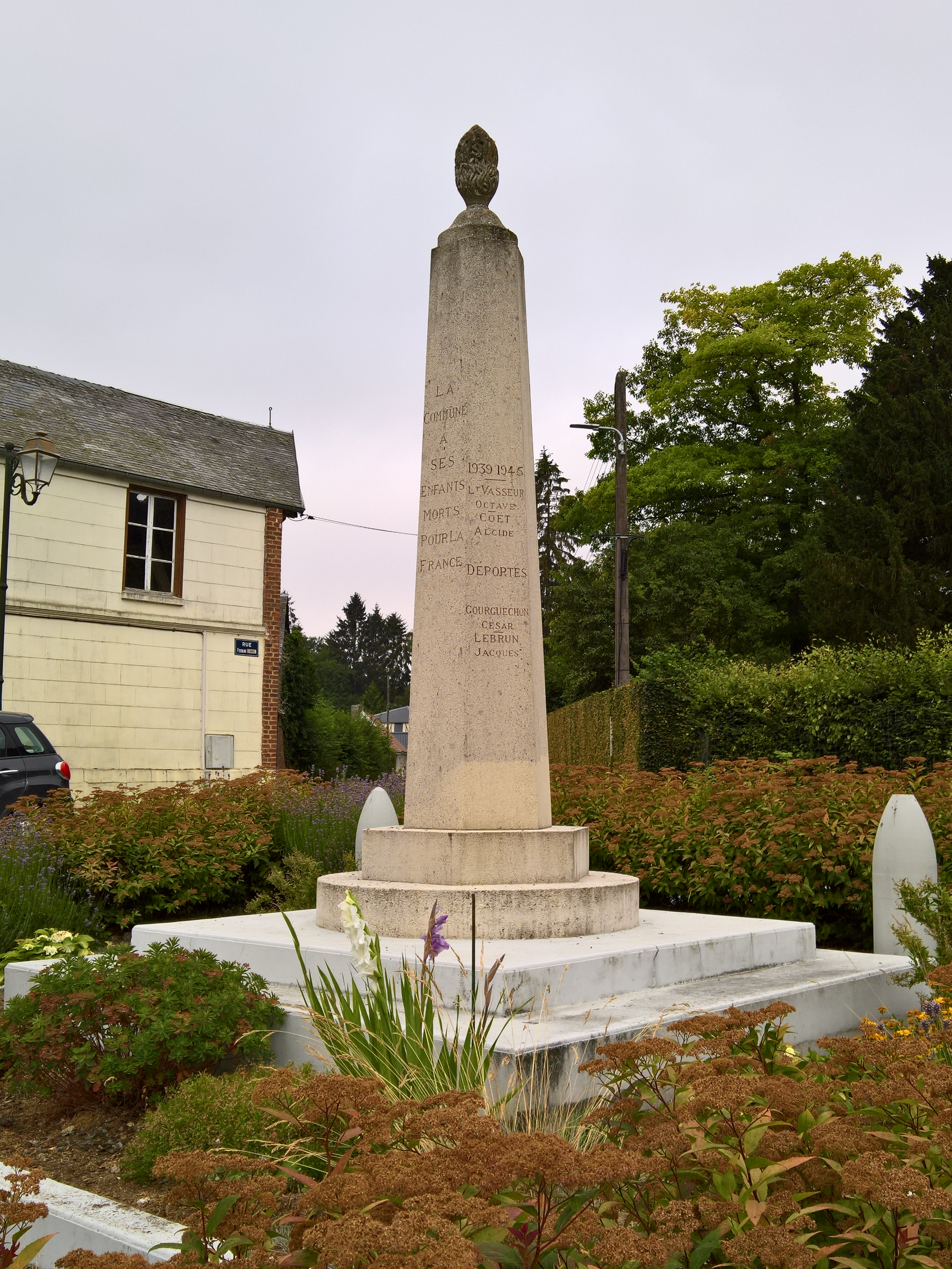 Cempuis - Côté droit du monument aux morts